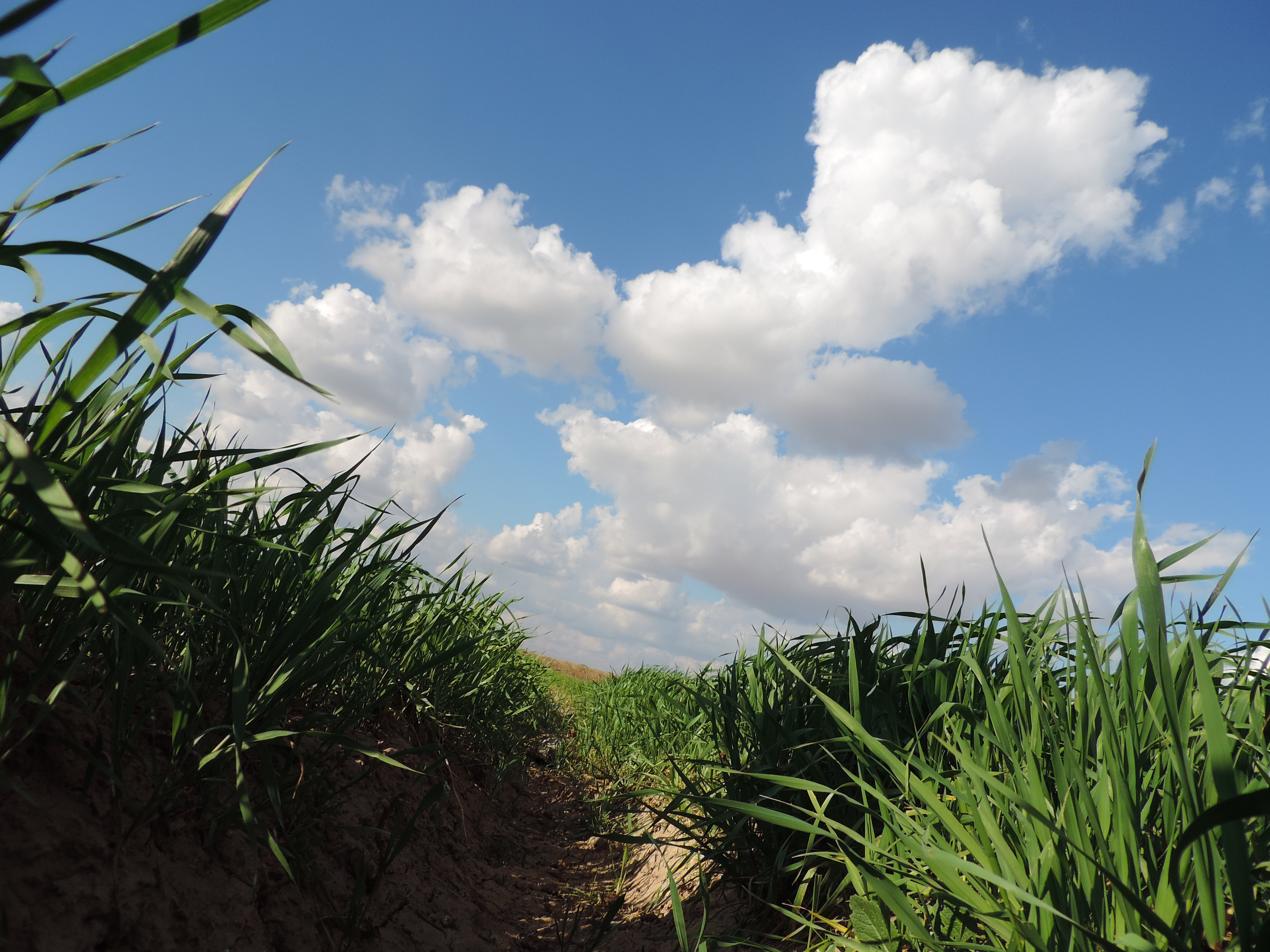 قرية بلاوة التركمانية تقع في الجهة الغربية من مدينة كركوك